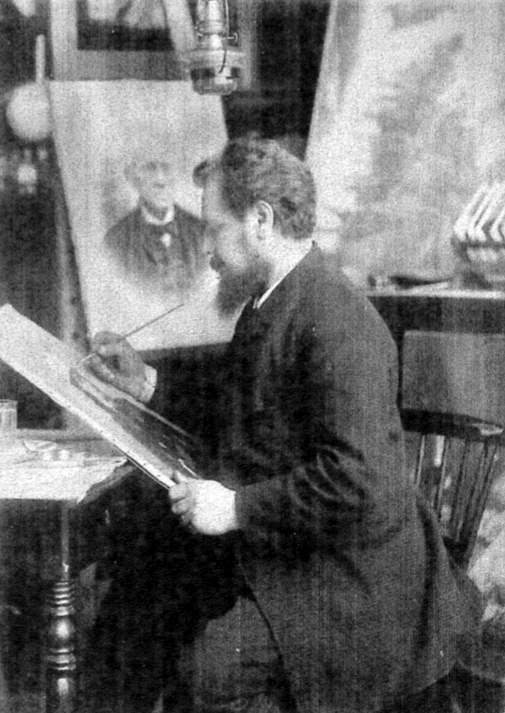 Axel Emil Nyberg i 1890-talets